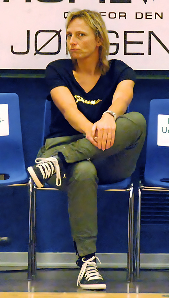 Tidligere håndboldspiller og nuværende sportschef Susanne Munk Wilbek fra Viborg HK Her under en kamp mod FC Midtjylland Håndbold i Viborg Stadionhal.